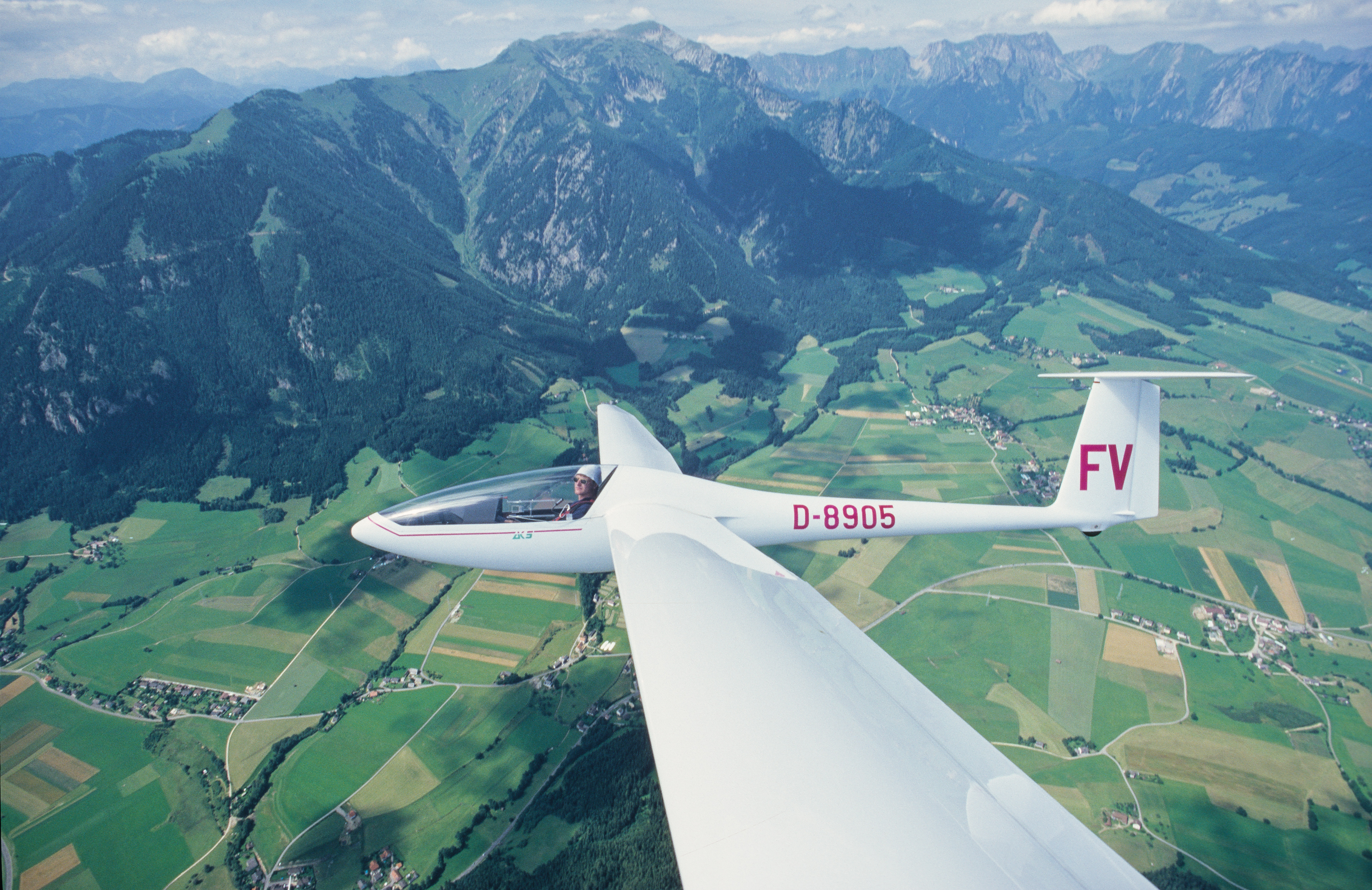 Flug über Timmersdorf/Steiermark mit der AK-5 der Akaflieg Karlsruhe.